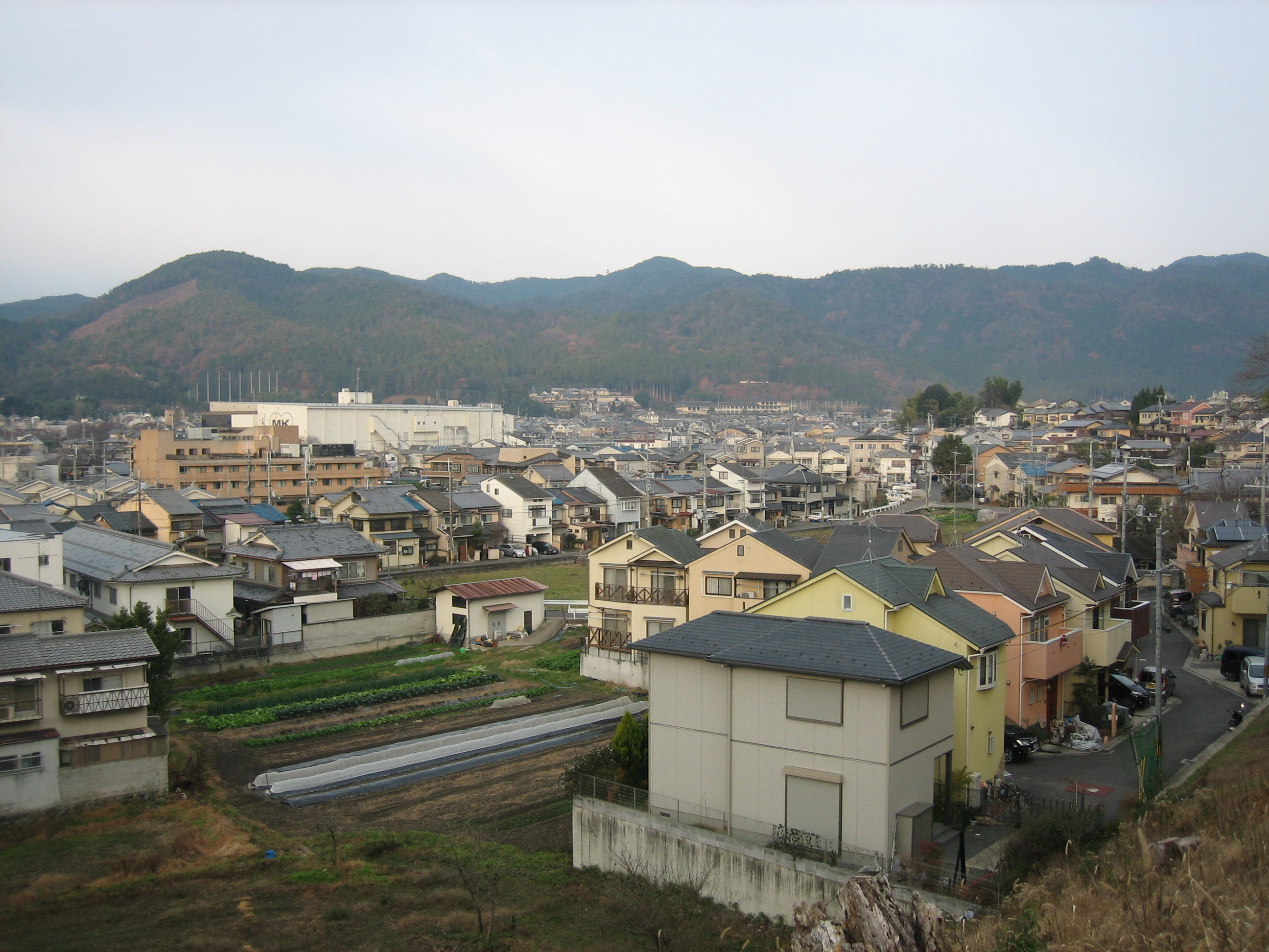 柊野一帯をバス停留所「柊野別れ」付近から撮影